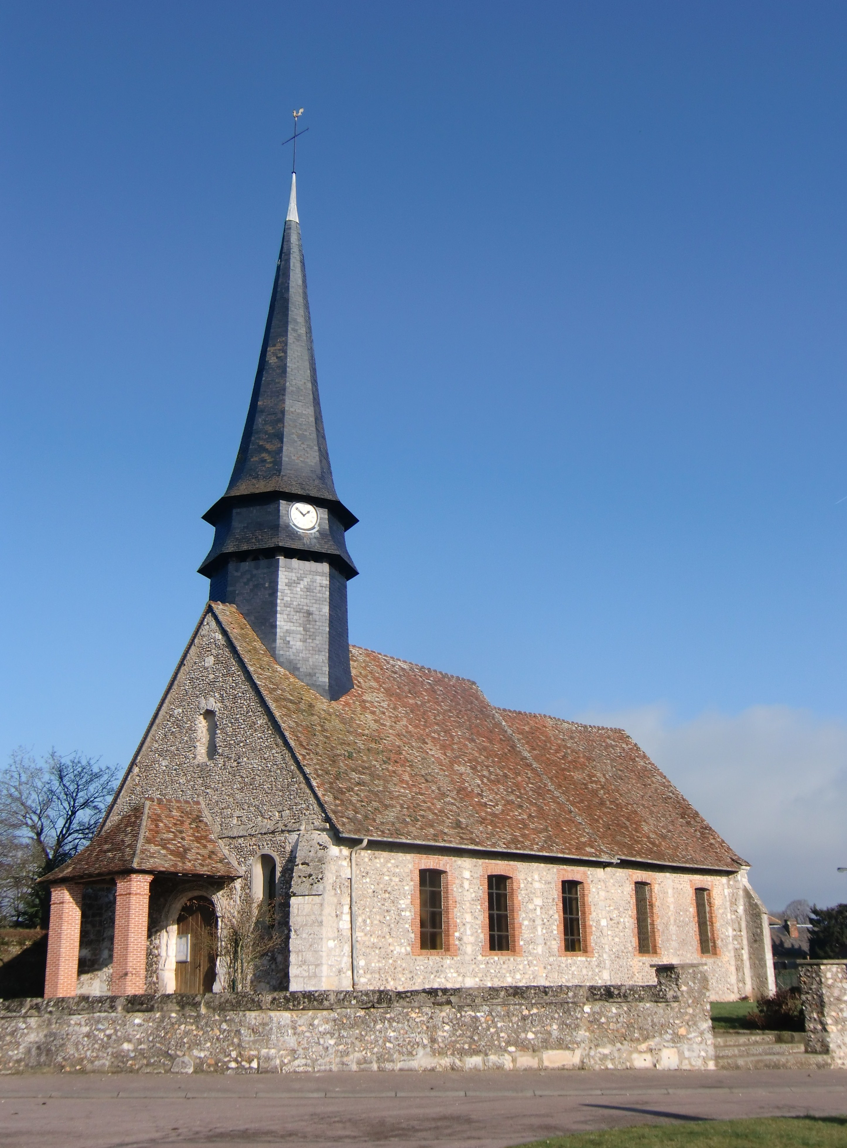 Eglise de Suzay (Eure, Normandie, France)